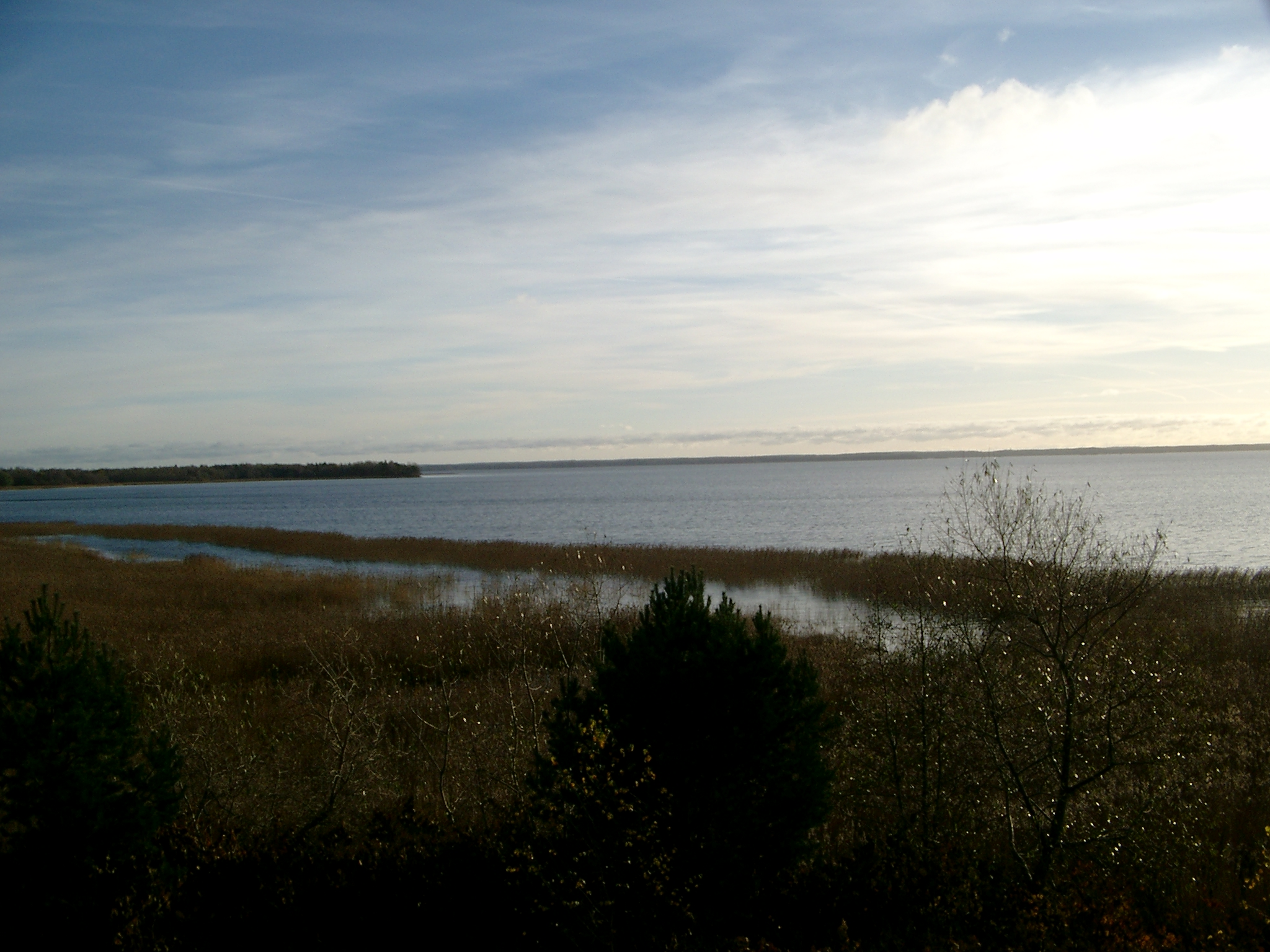 Der See Glan vom alten Reichsweg 51 westlich von Svärtige aus gesehen.